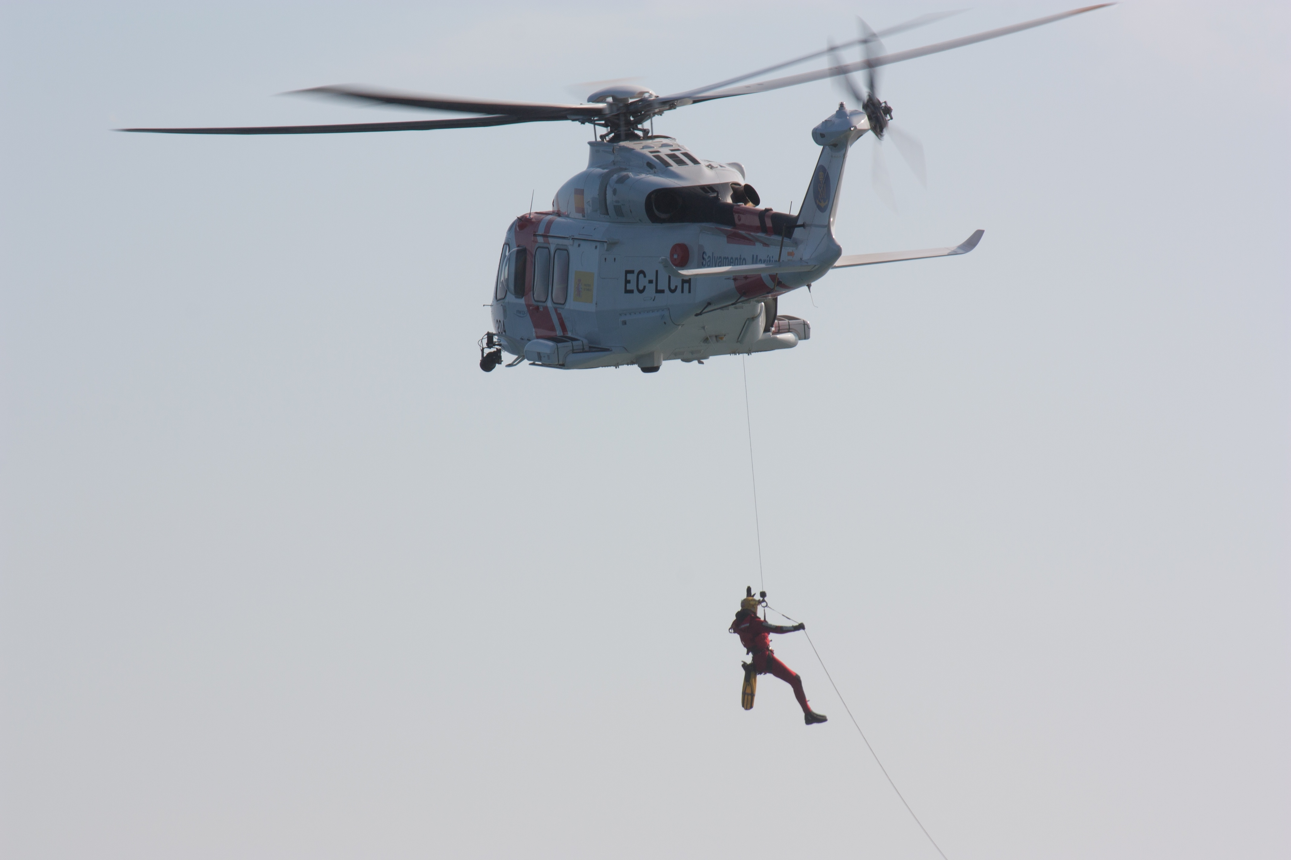 EC-LCH AW139